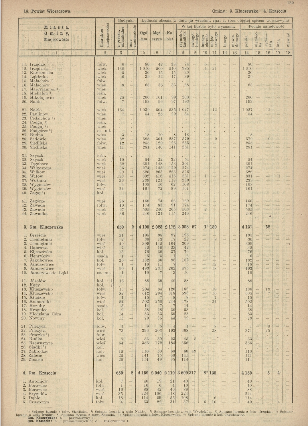 Skorowidz miejscowości Rzeczypospolitej Polskiej opracowany na podstawie wyników Pierwszego Powszechnego Spisu Ludności z dn. 30 września 1921 r. i innych źródeł urzędowych. T. 4 : Województwo kieleckie; Domena Publiczna. Wolno zwielokrotniać, zmieniać i rozpowszechniać oraz wykonywać utwór, nawet w celach komercyjnych, bez konieczności pytania o zgodę. Wykorzystując utwór należy pamiętać o poszanowaniu autorskich praw osobistych Twórcy.